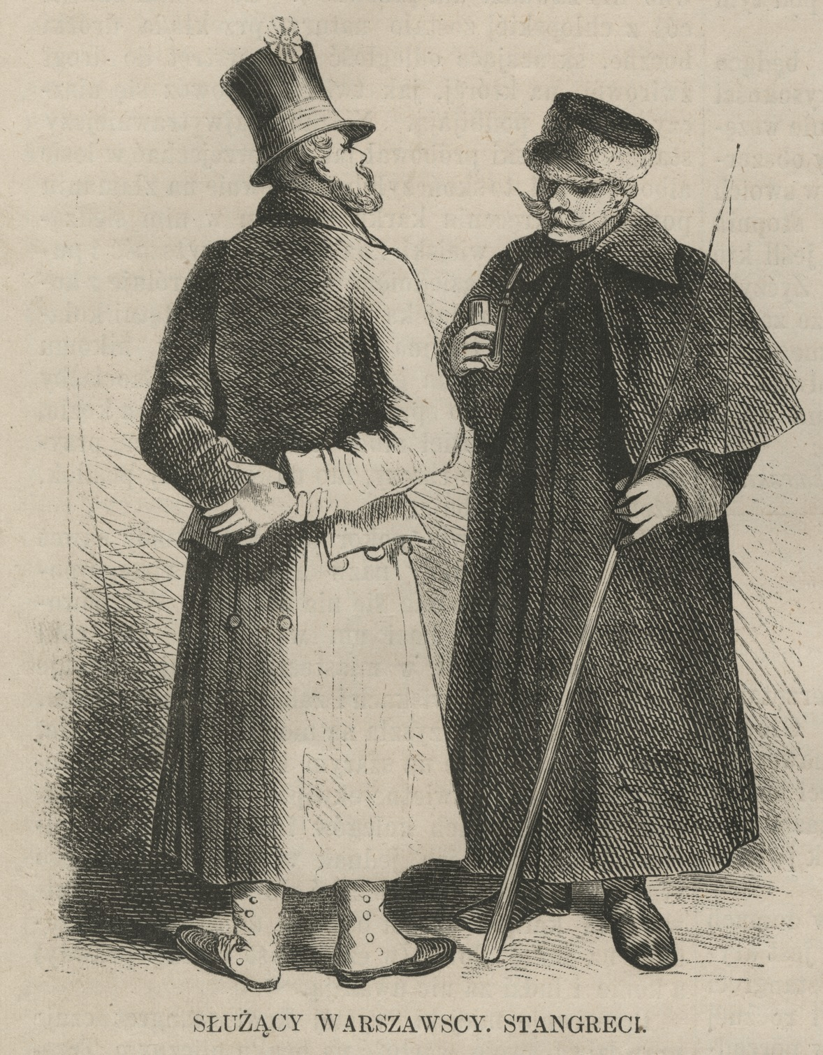 Stangreci